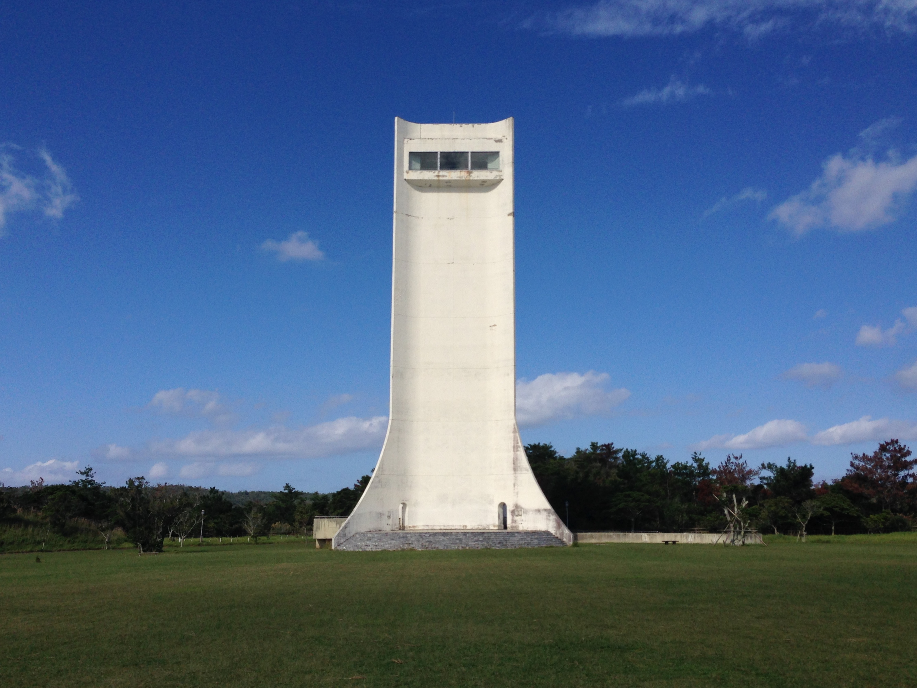 2013年8月撮影